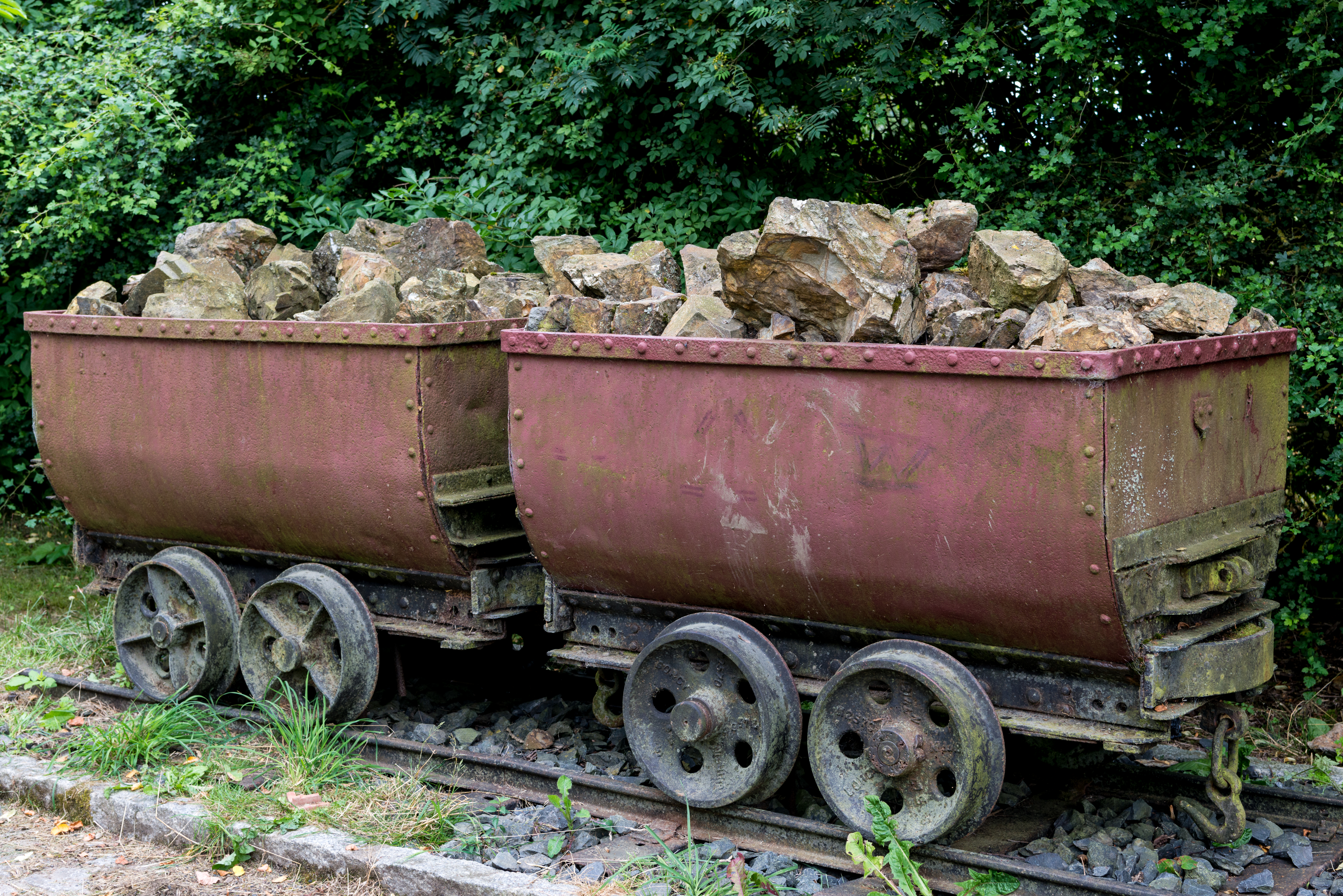 Den Buggie mat Antimon, op der Minn zu Géisdref .